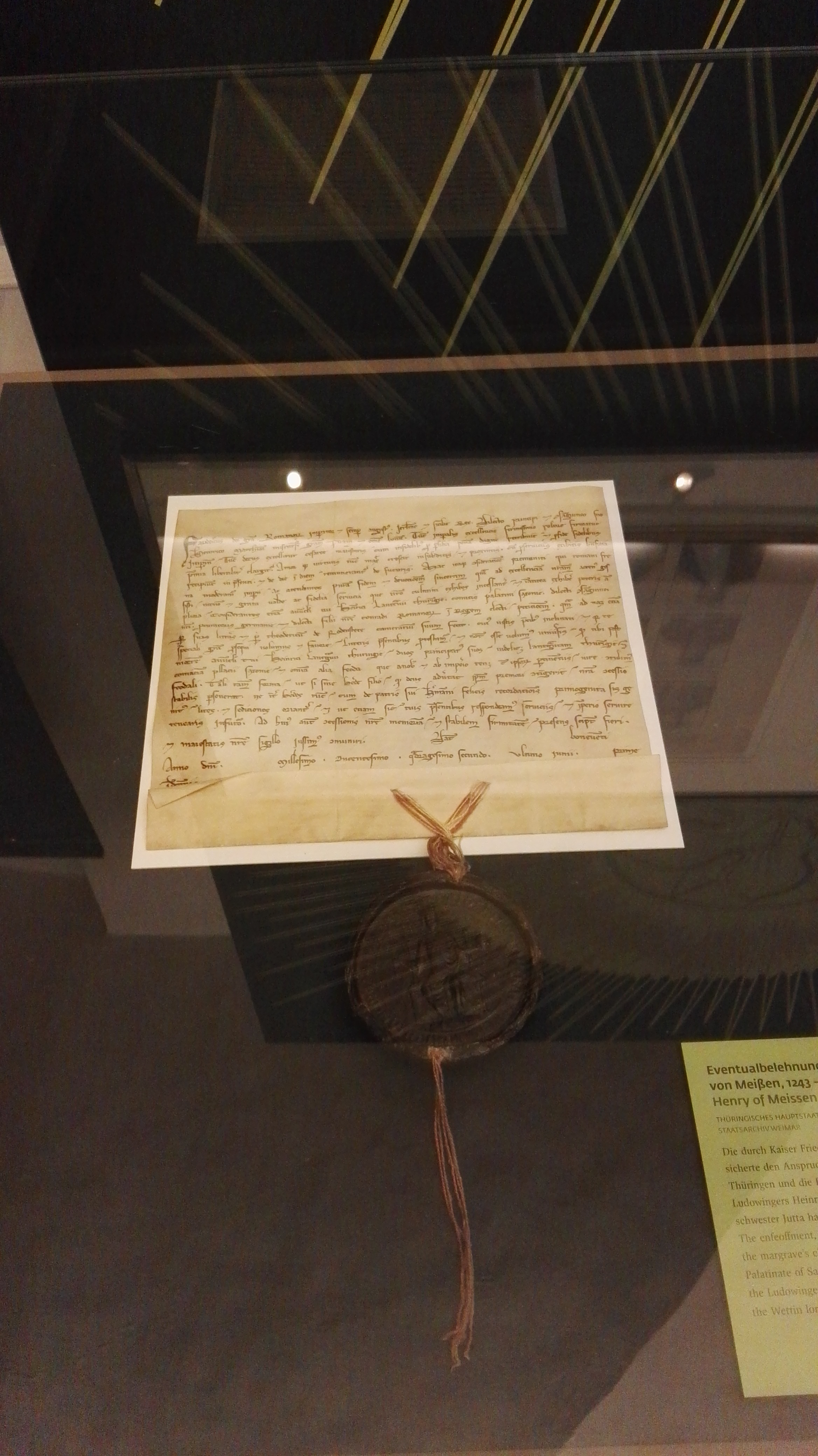 Eventualbelehnung Heinrich des Erlauchten mit der Landgrafschaft Thüringen durch Friedrich II.